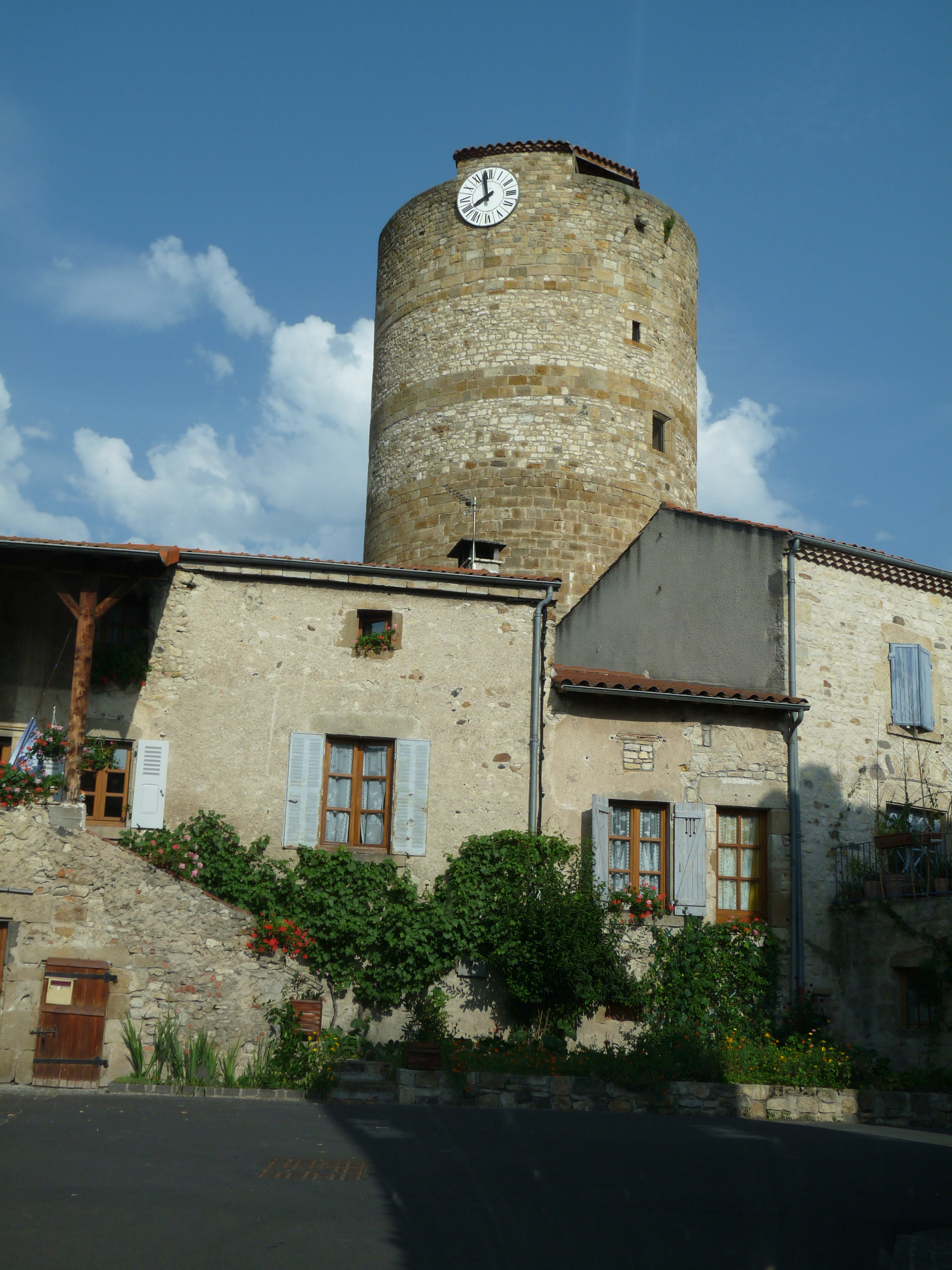 la tour et maisons de la Sauvetat, Puy de Dome